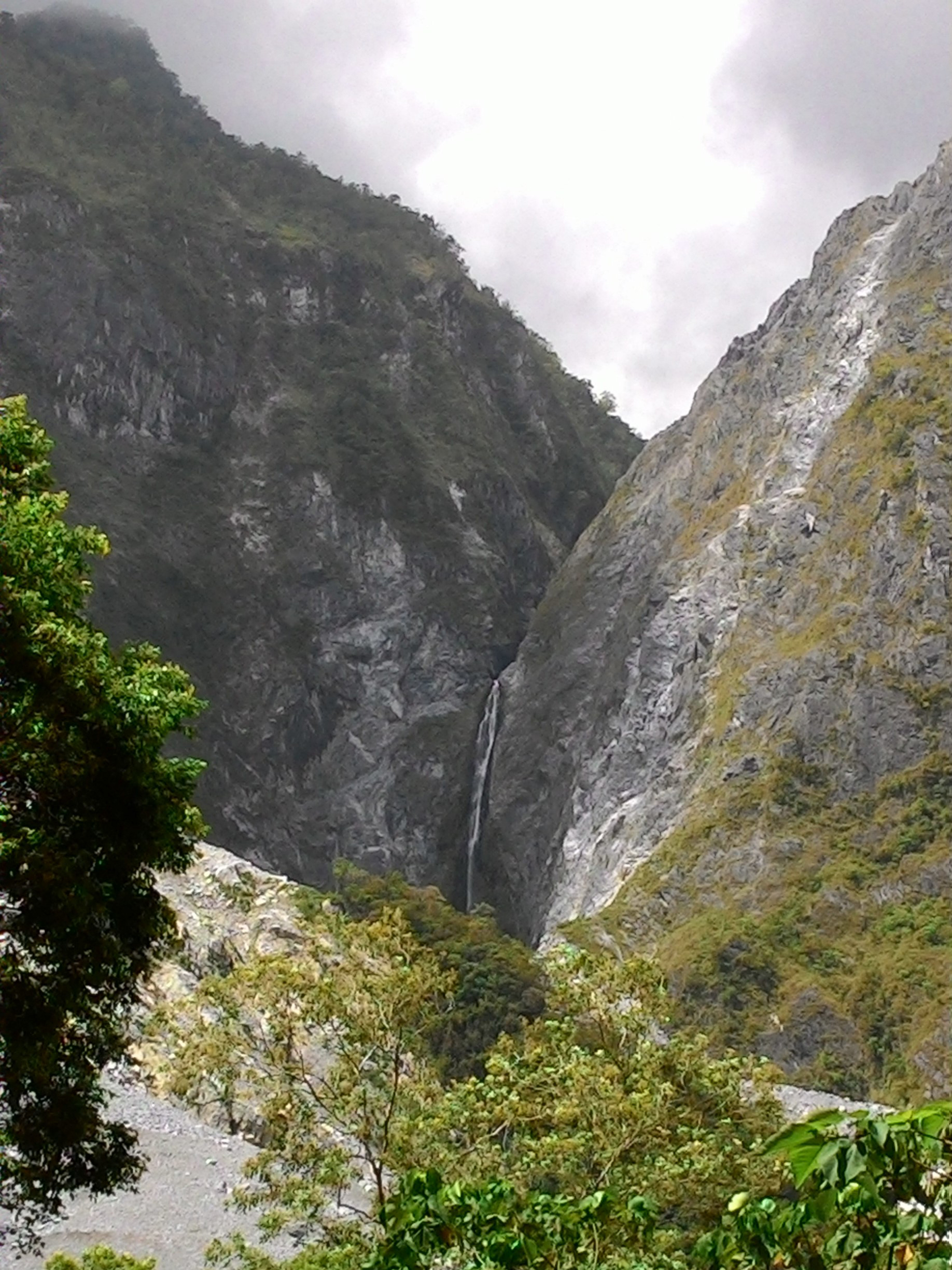 於中橫公路上遠眺白沙瀑布